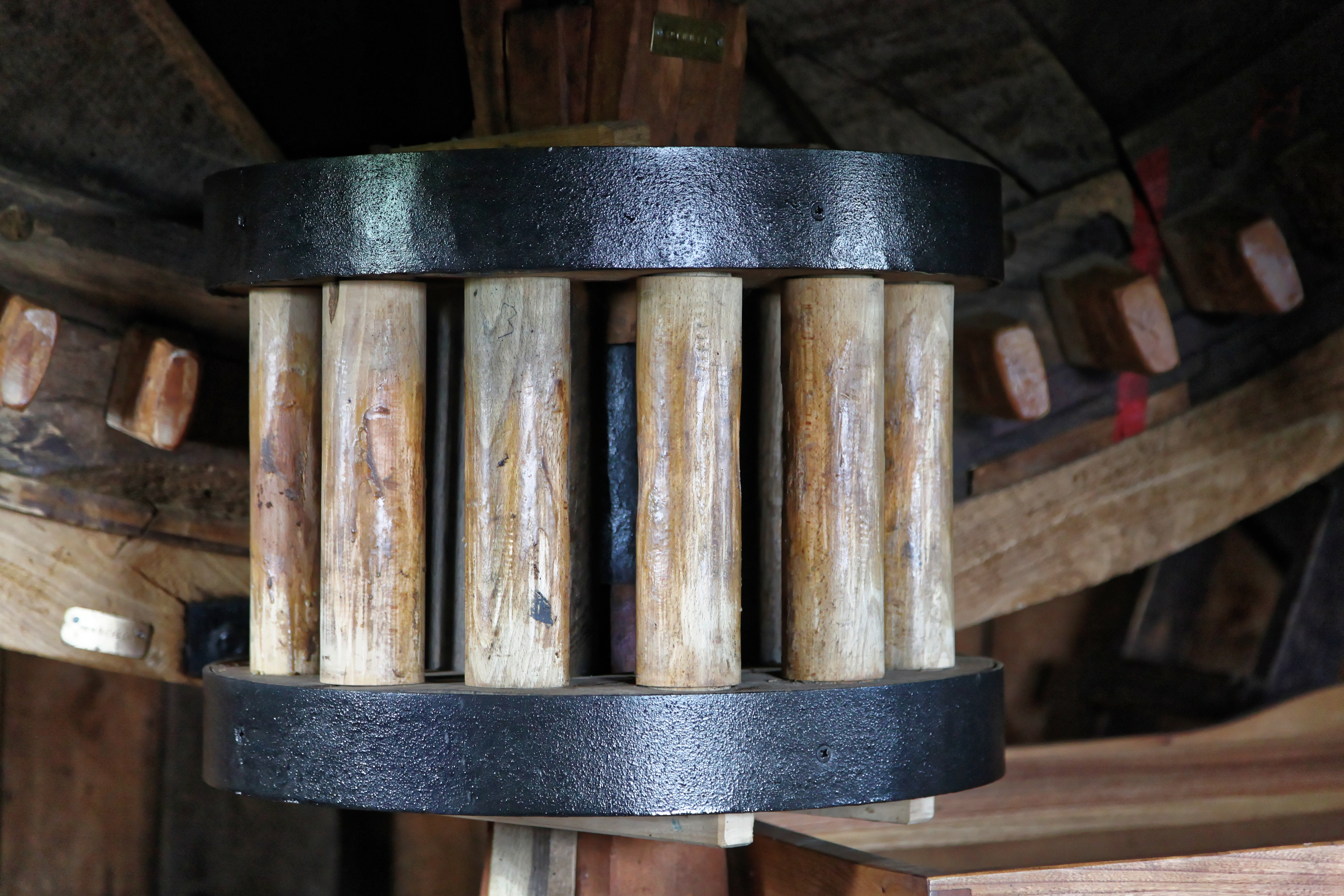 Bockwindmühle, Fahnenweg in Papenburg am Deutschen Mühlentag 2017